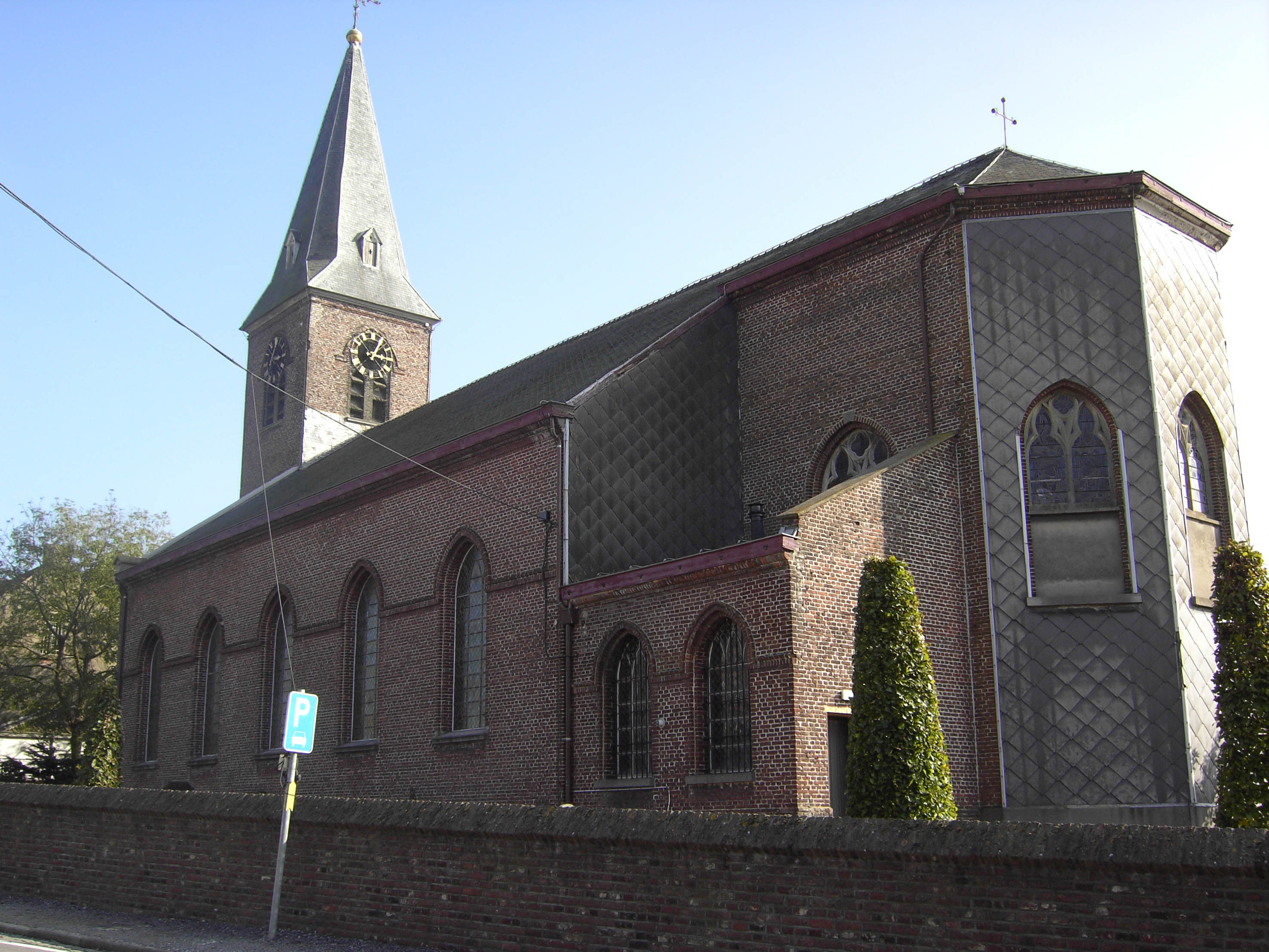 Gijzelbrechtegem (in de volksmond Grijsloke) - kerk - deelgemeente van Anzegem (West-Vlaanderen).